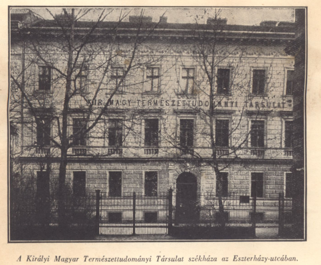 A Királyi Magyar Természettudományi Társulat székháza az Eszterházy utcában, Budapest, Eszterházy utca (ma Pollack Mihály tér)